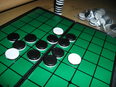 自己攝的黑白棋